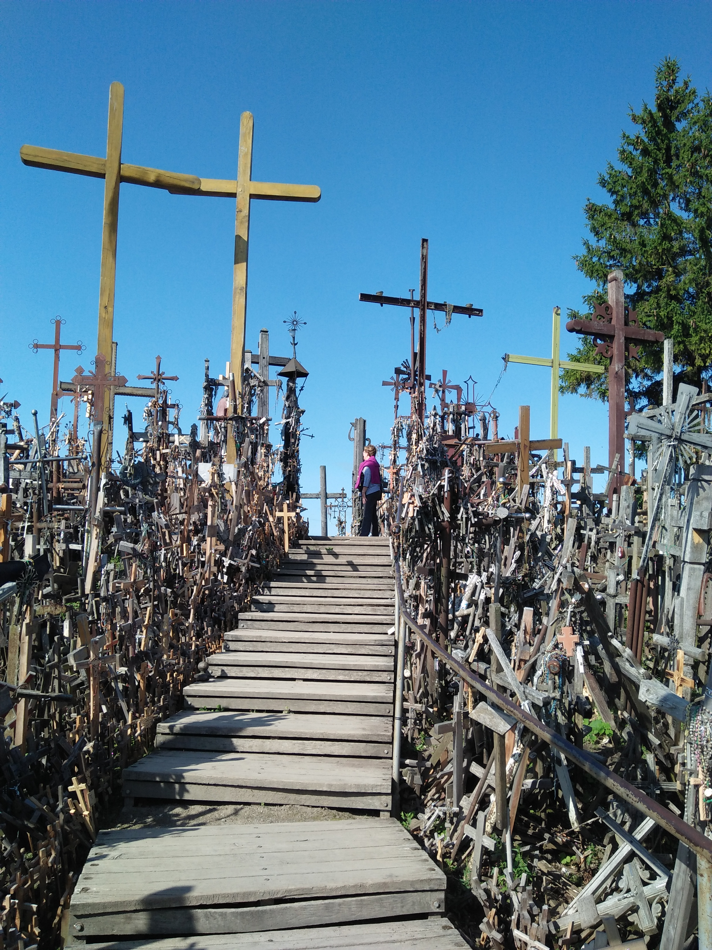 Hora krížov